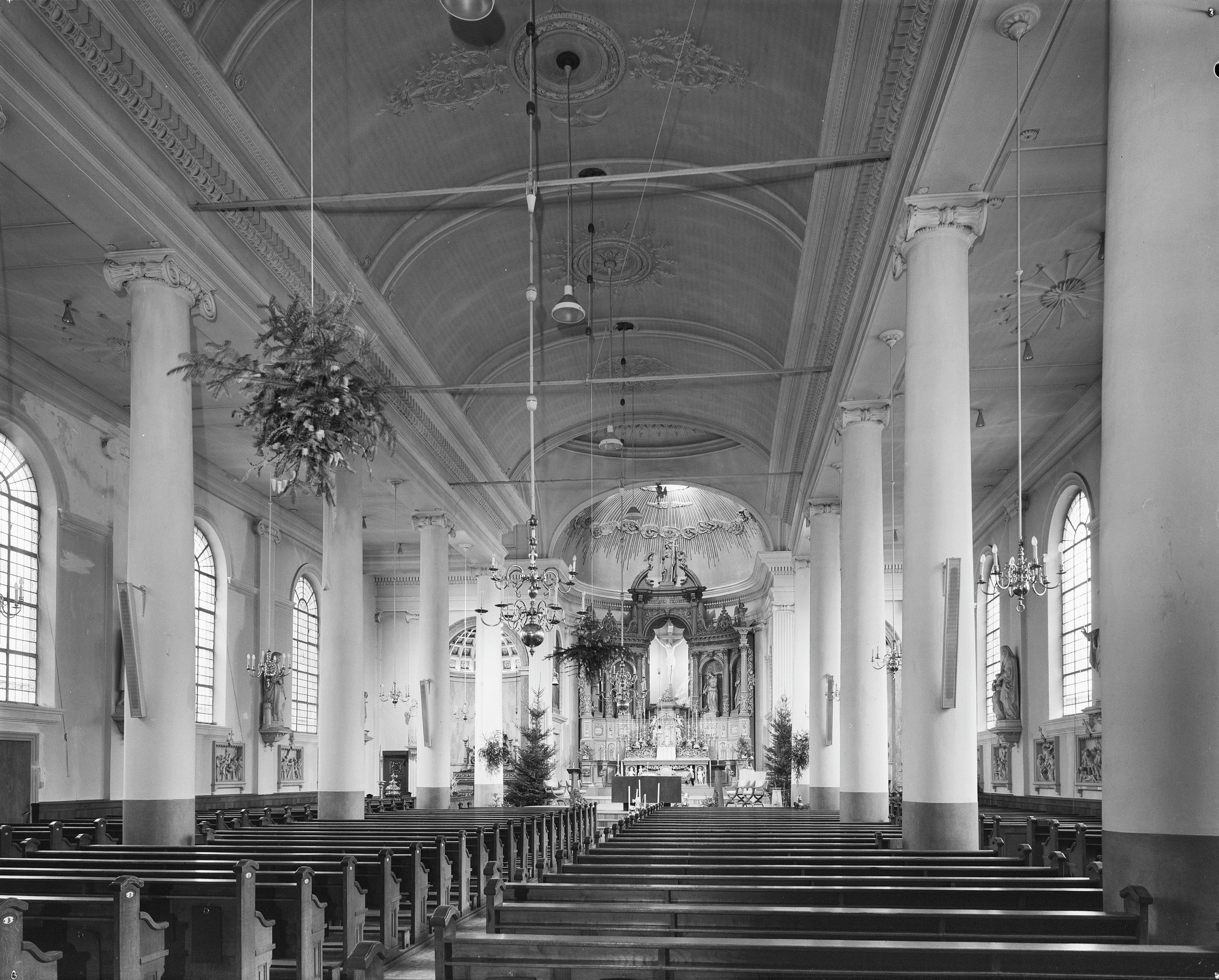 Rooms-Katholieke Kerk Aan 't Zand: interieur naar het oosten